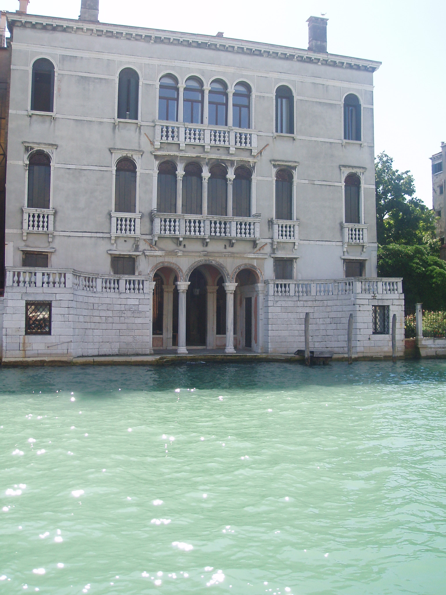 pal balbi valier sammartini grand canal venise